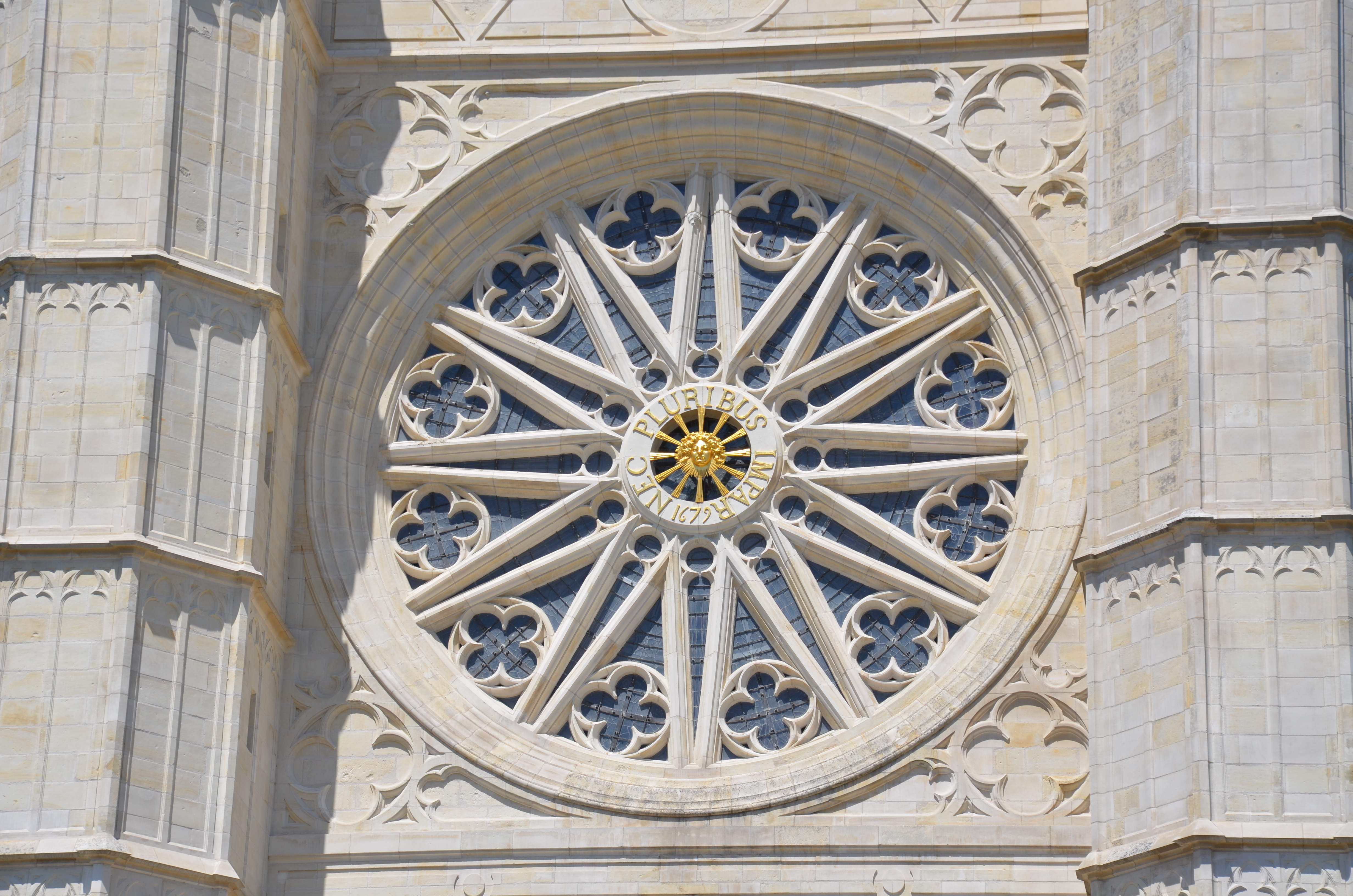 Devise latine de Louis XIV sur la rosace du transept sud de la cathédrale Sainte Croix d'Orléans (France).